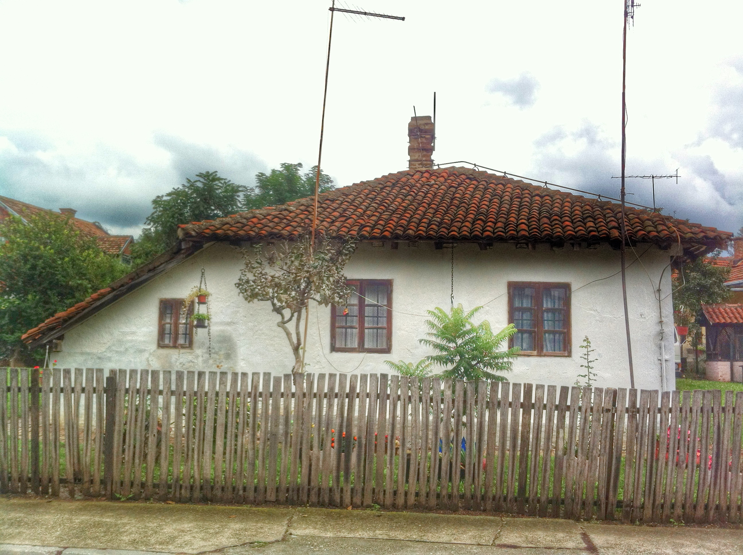 Српски (ћирилица): Фронтални поглед са улице Јована Цвијића.